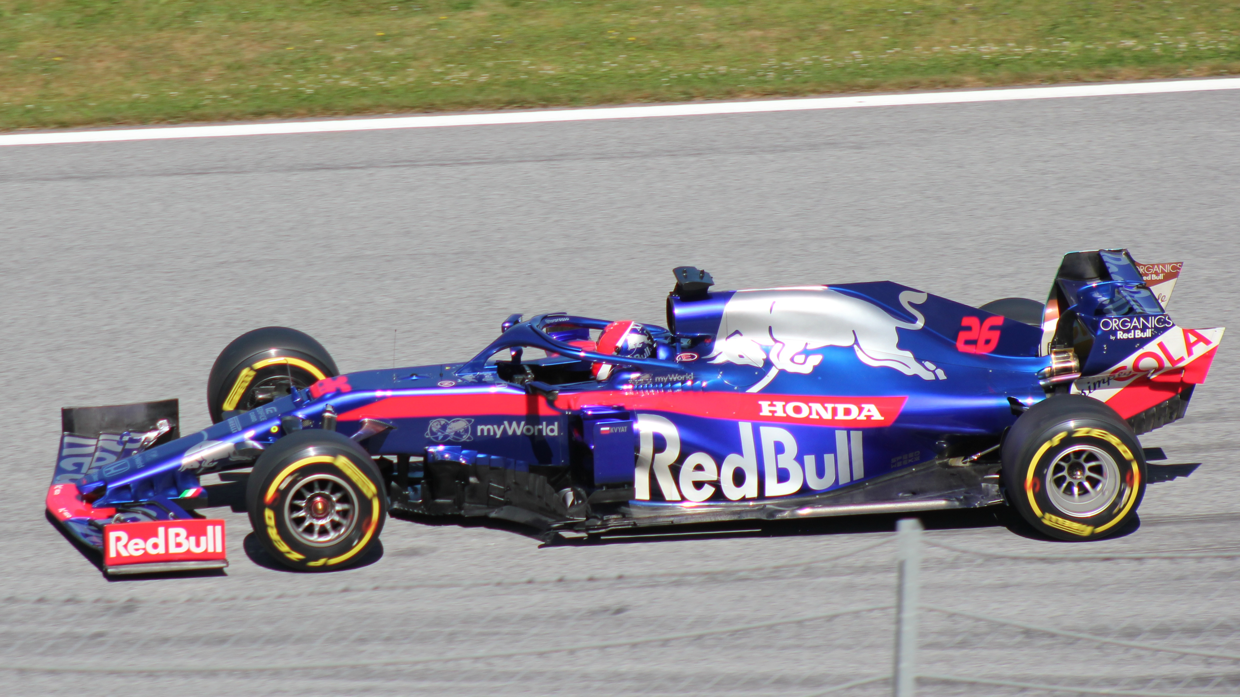 Kvyat beim Rennwochenende in Österreich 2019